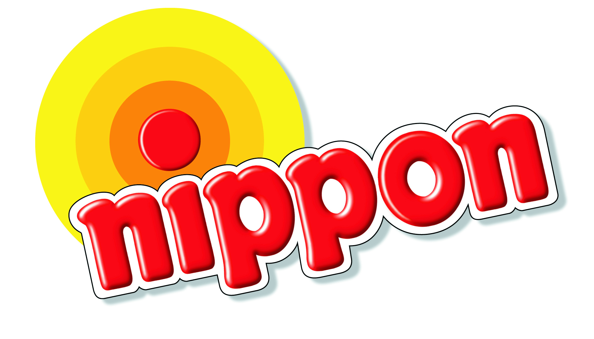 Nippon Logo